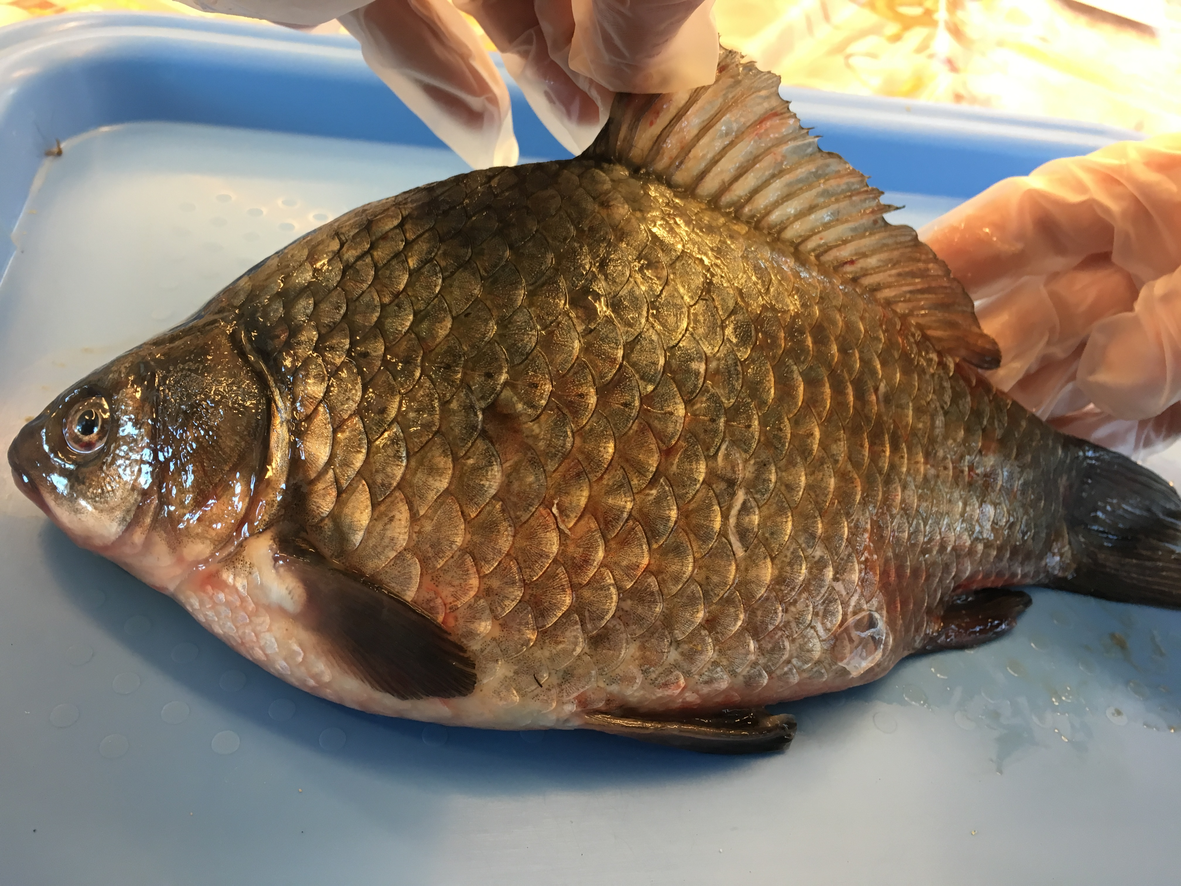 Hõbekogra (Carassius gibelio) seljauim